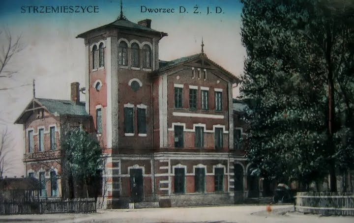 Pocztówka wyd. R. Brandysa (Strzemieszyce 1917) przedstawiająca dworzec Kolei Iwangorodzko-Dąbrowskiej